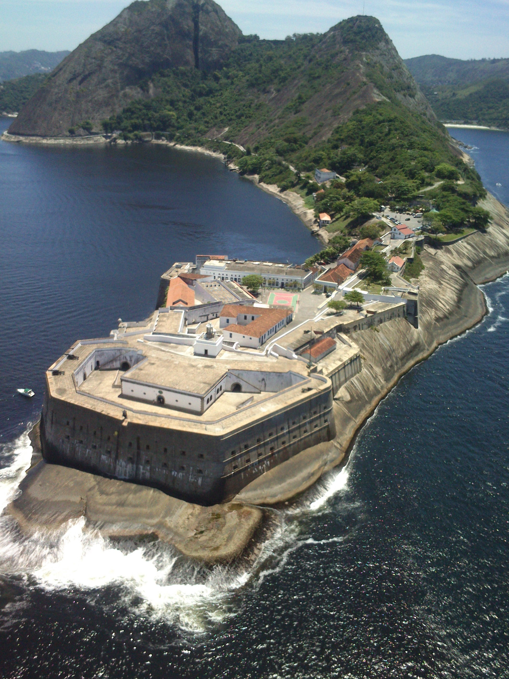 Vista aérea da Fortaleza de Santa Cruz, Niteroi/Rj